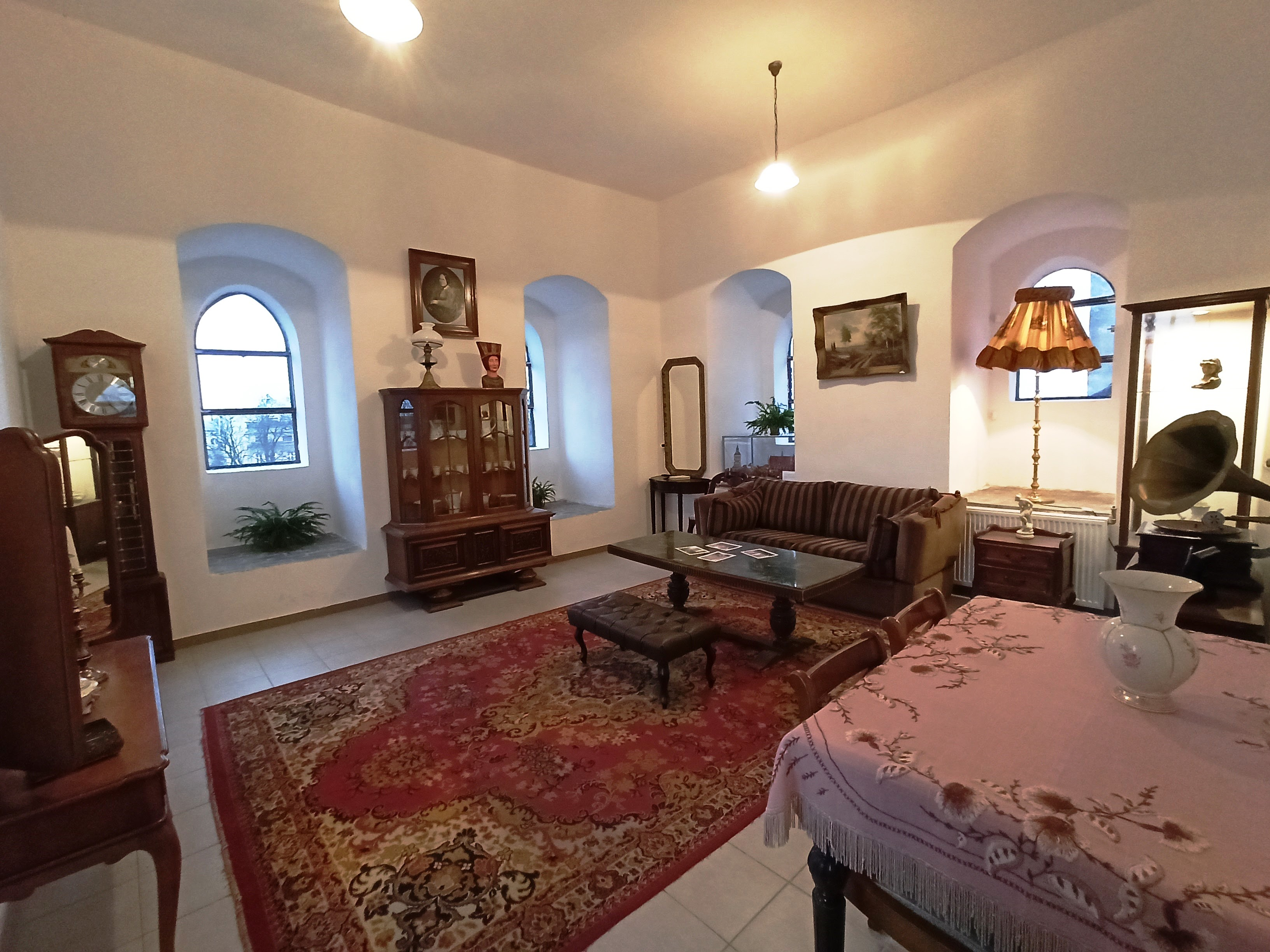 Braniewo Muzeum Ziemi Braniewskiej Wieża Klesza III piętro – pokój mieszczański (ekletyzm)